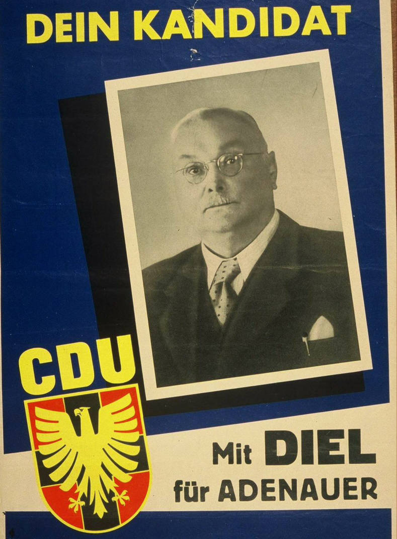 Dein Kandidat Mit Diel für AdenauerAbbildung:PorträtfotoPlakatart:Kandidaten-/Personenplakat mit PorträtObjekt-Signatur:10-001: 588Bestand:Plakate zu Bundestagswahlen (10-001)GliederungBestand10-18:Plakate zu Bundestagswahlen (10-001) » Die 2. Bundestagswahl am 6. September 1953 » CDU » Mit PorträtfotoLizenz:KAS/ACDP 10-001: 588 CC-BY-SA 3.0 DE